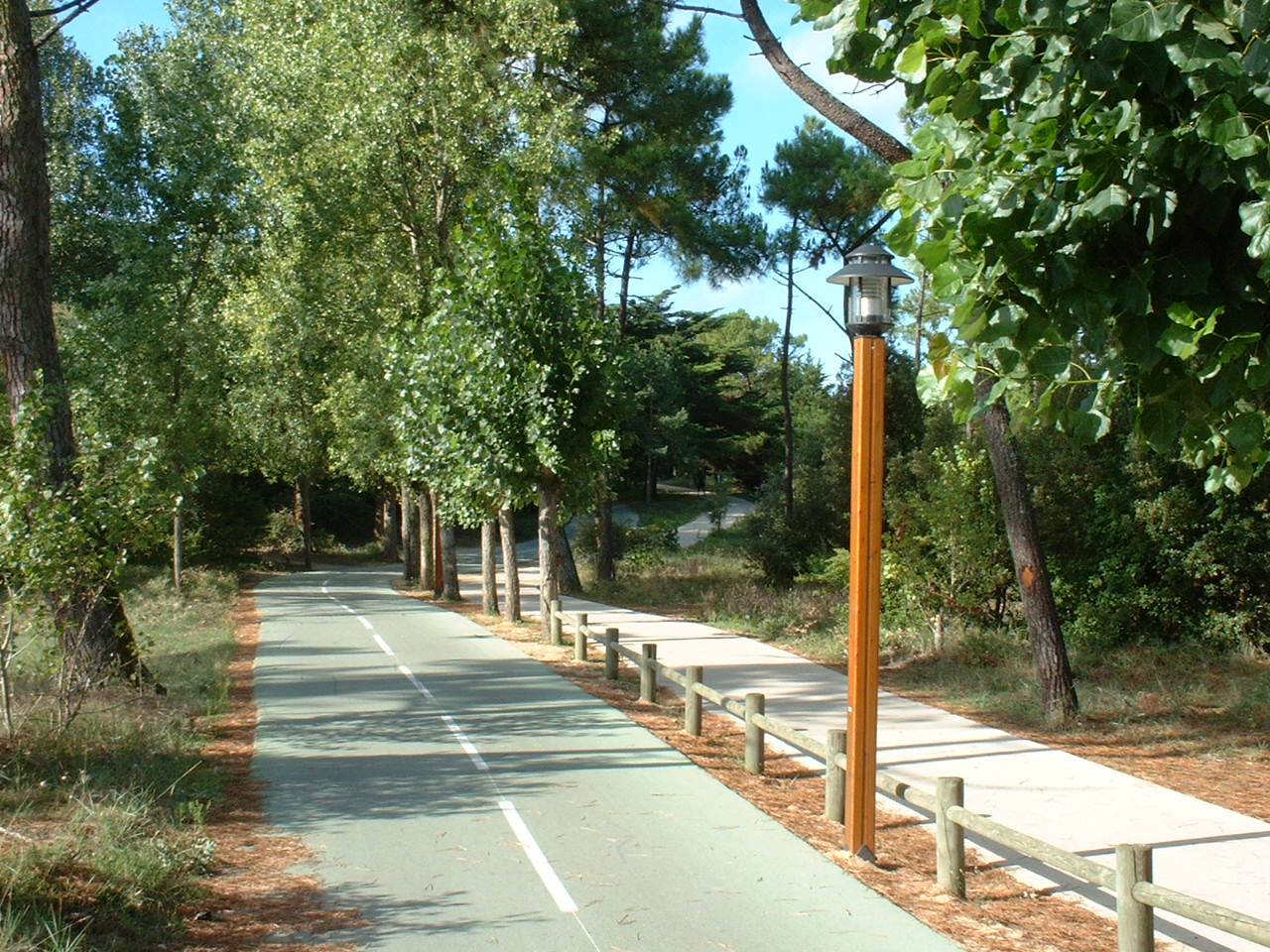 Piste cyclabe en "site propre" à Saint Jean de Monts.